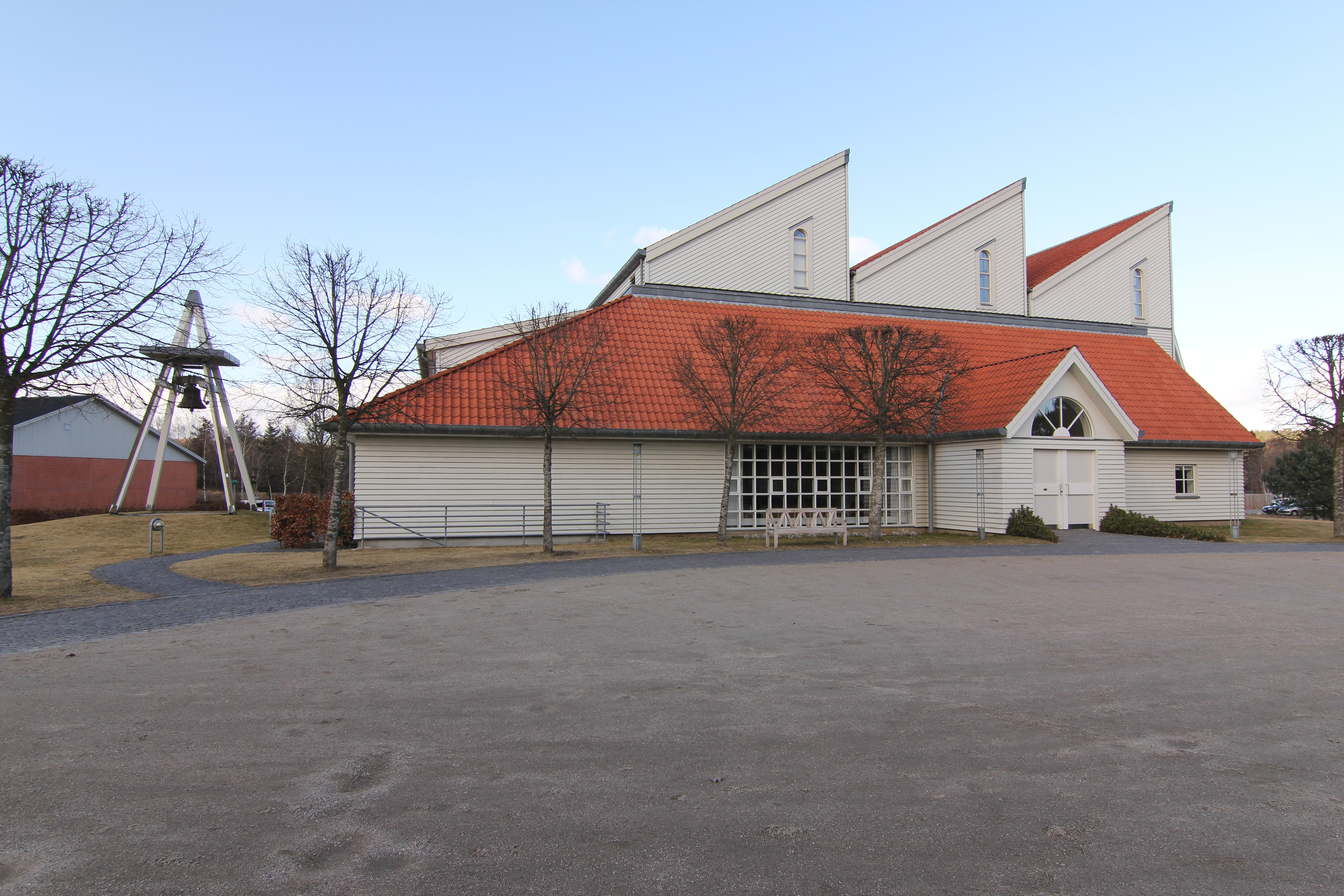 Sejs-Svejbæk Kirke i Silkeborg Kommune